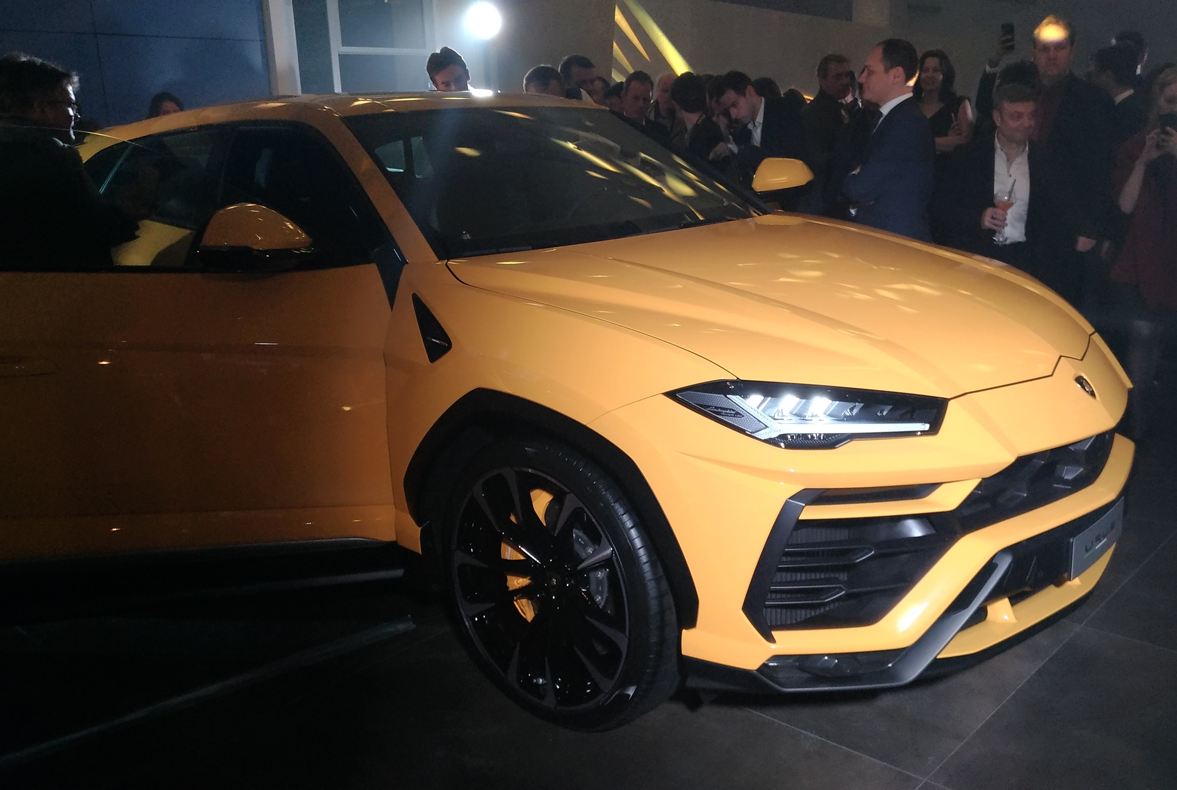 Lamborghini Urus soirée inaugurale concession Lamborghini Paris